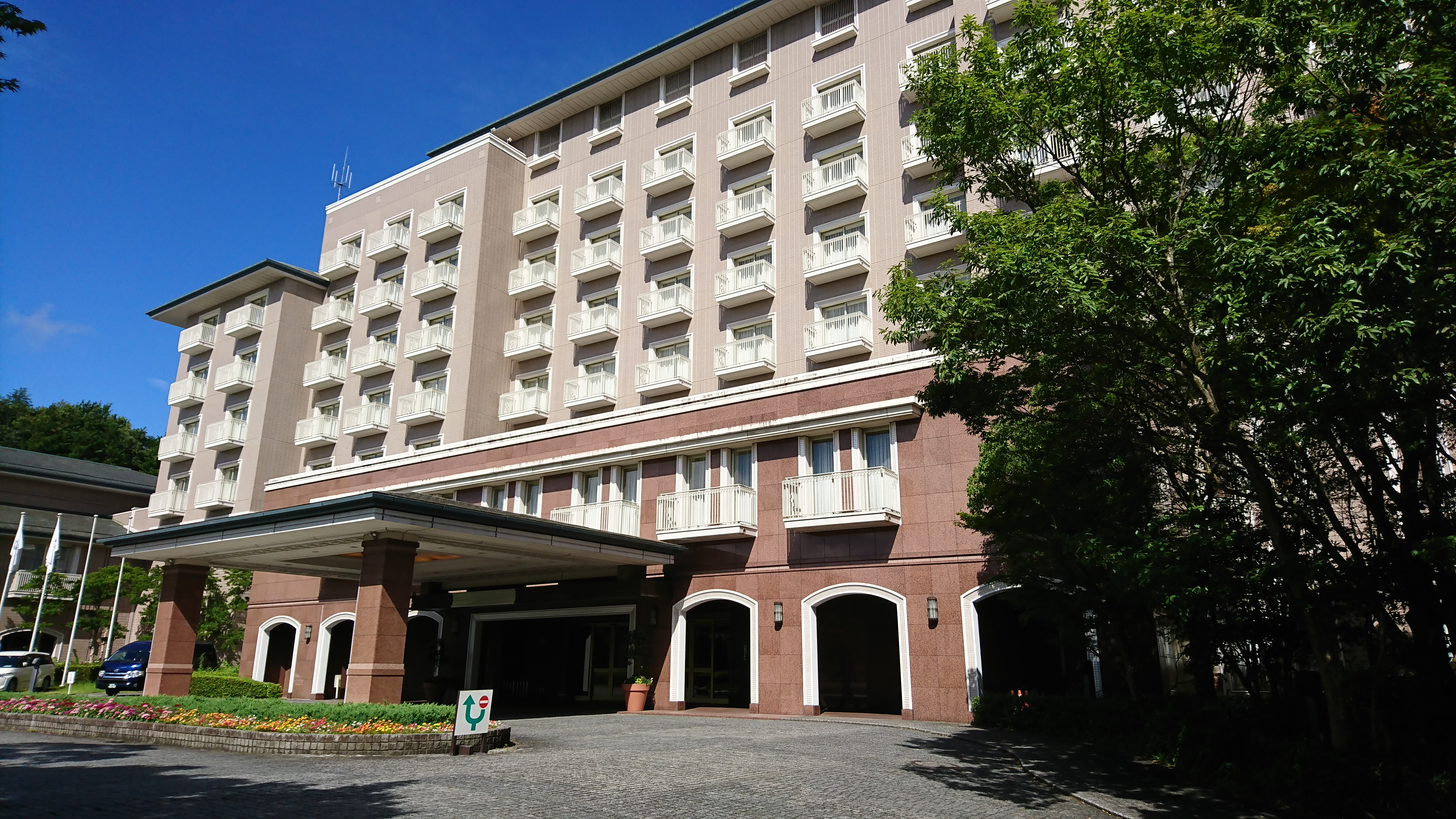 千葉県木更津市にあるオークラアカデミアパークホテル。2019年8月6日撮影。